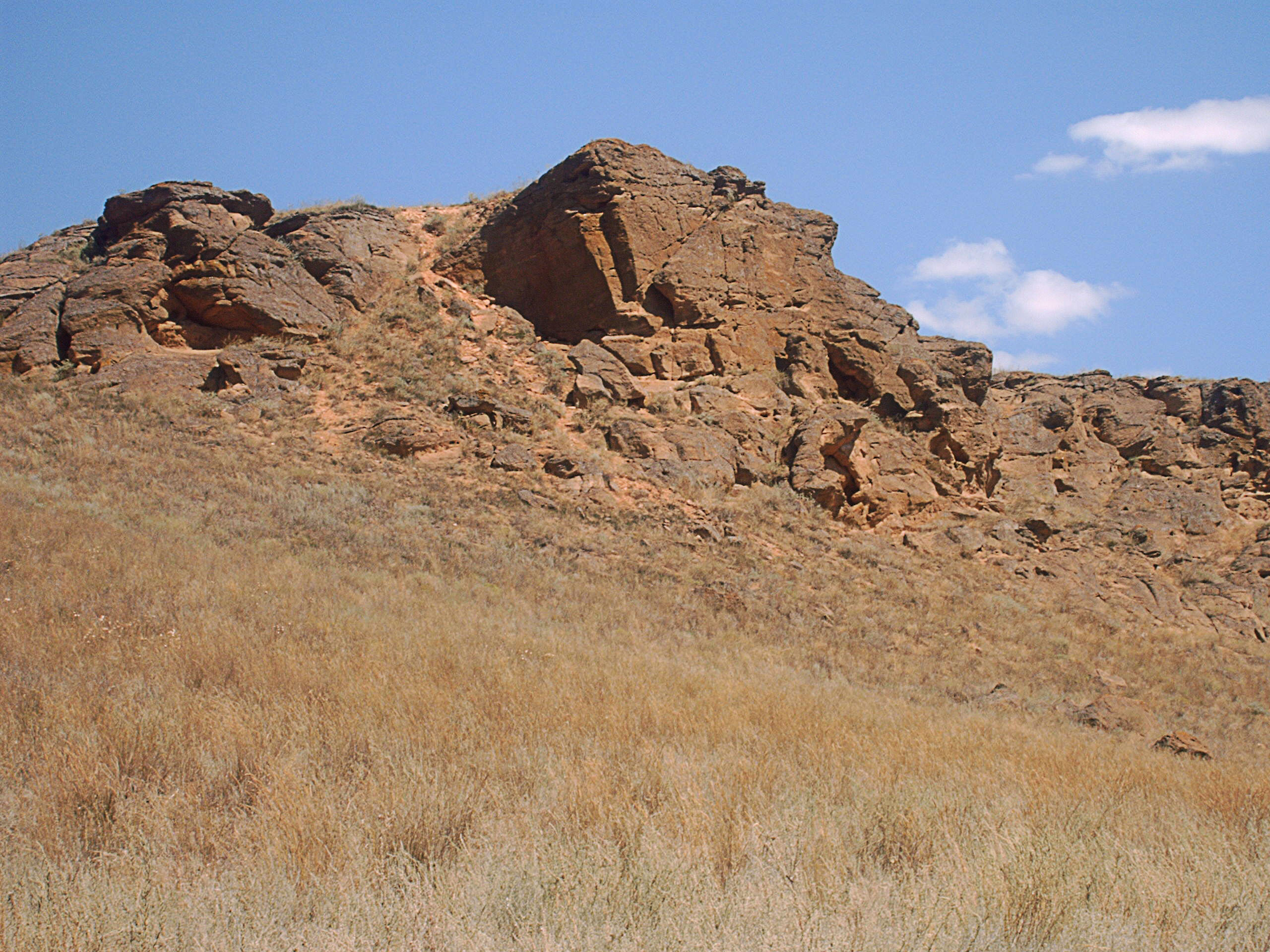 гора Богдо, Ахтубинский район